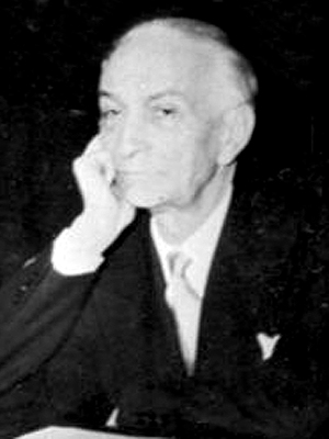 Antonio Segni, primer ministro de Italia entre 1955 y 1957.